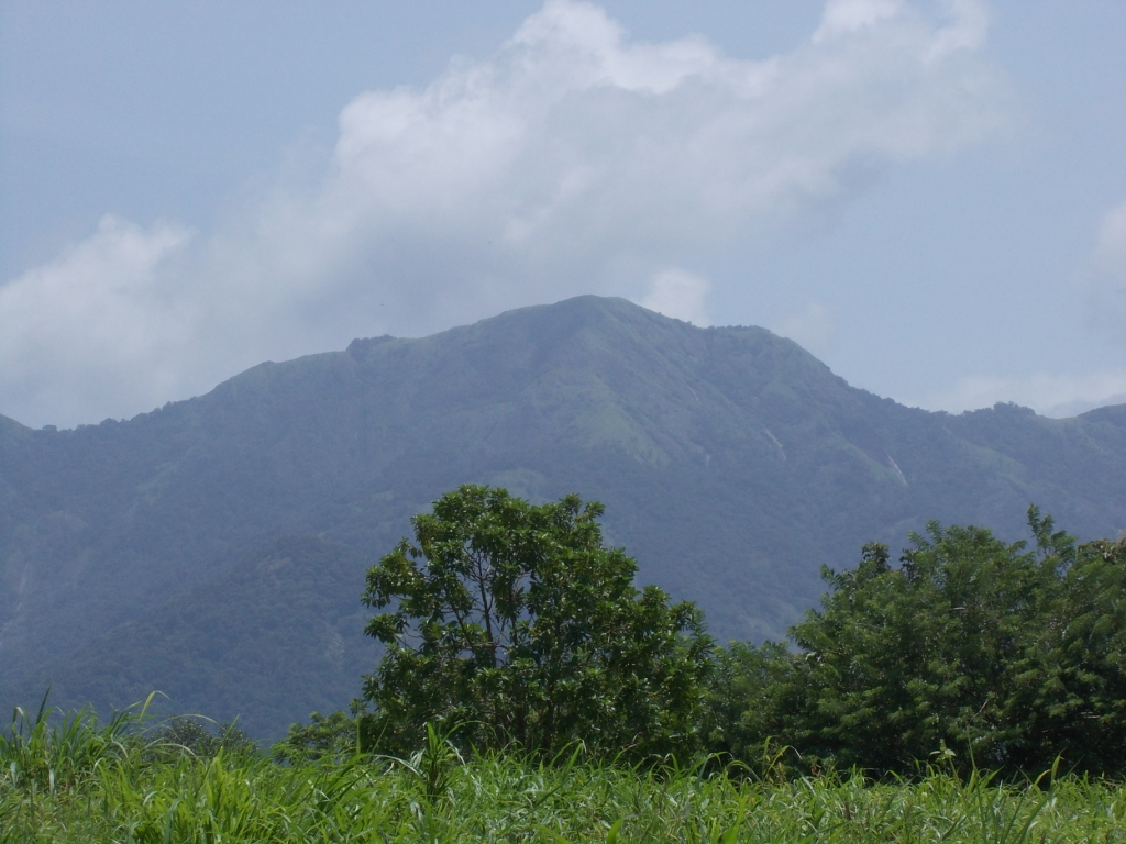 തിരുവിഴാംകുന്ന് മല